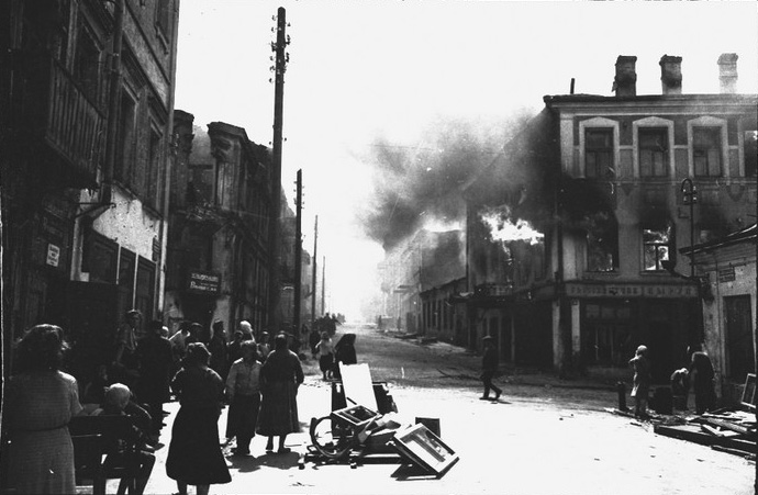 Беларуская (тарашкевіца): Менск (Miensk), вуліца Койданаўская (vulica Kojdanaŭskaja) у бок скрыжаваньня з Фэліцыянаўскай (vulica Felicyjanaŭskaja)